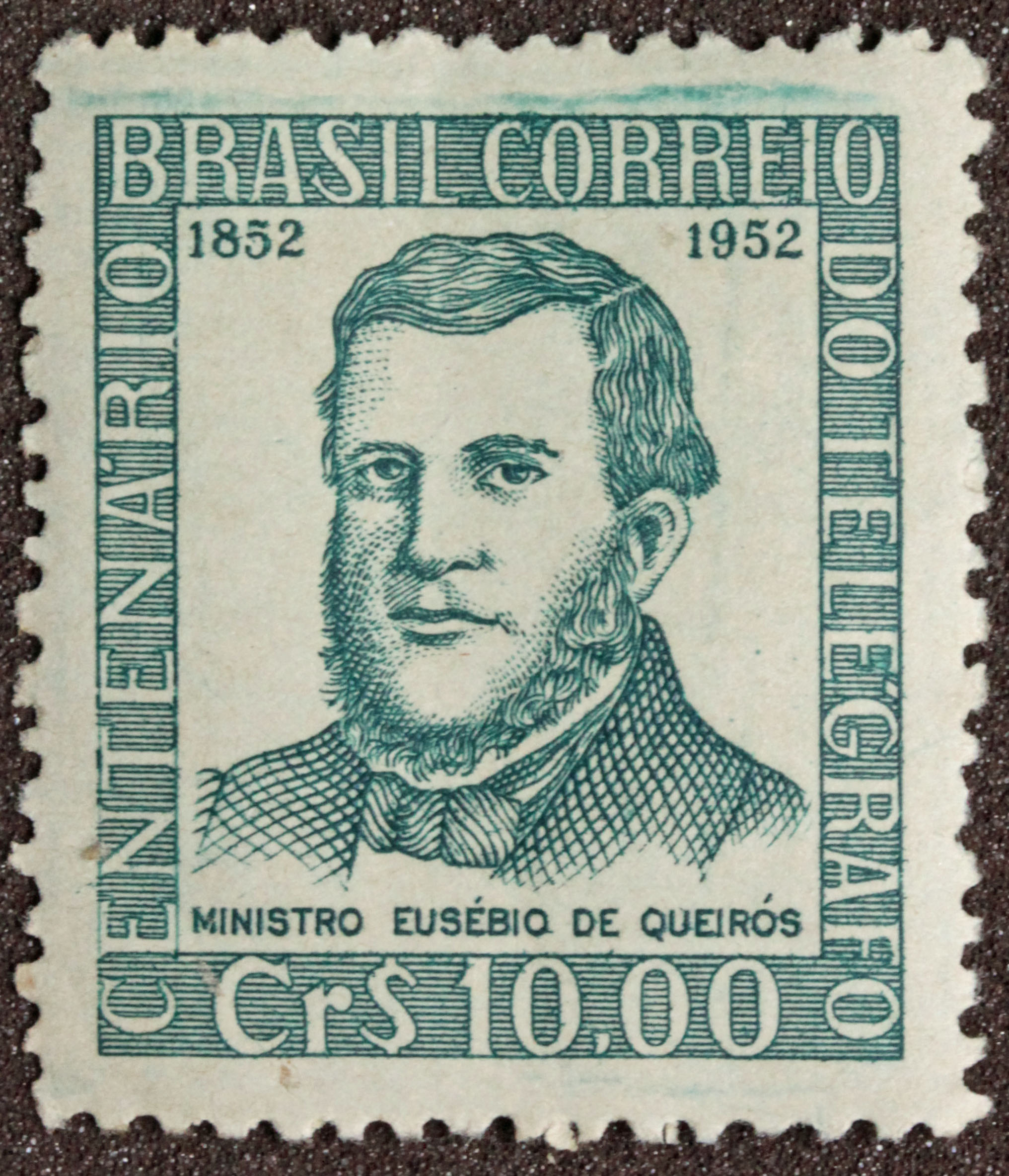 Selo comemorativo do Centenário do Telégrafo: 1852-1952. Ministro Eusébio de Queirós. Valor CR$ 10,00